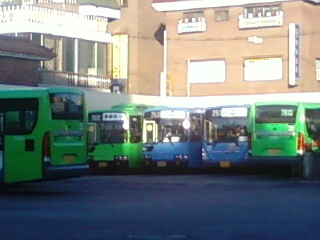 선진운수 갈현종점